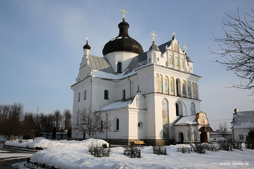 Магілёў. Мікольскі сабор